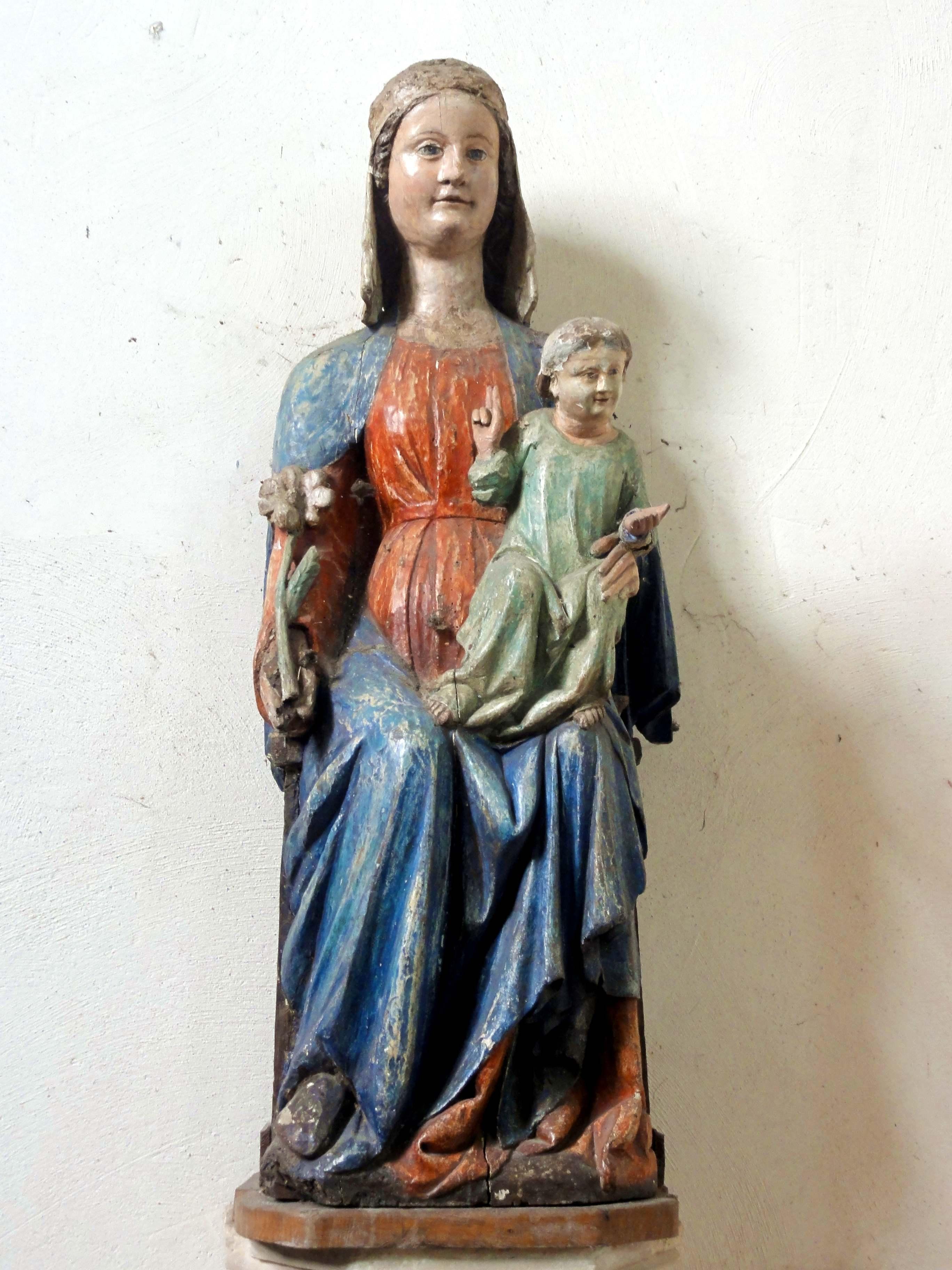 Statue de N.D. des Champs, bois, XIIIe siècle. La base Palissy montre la photo de l'autre Vierge à l'Enfant, qui est en pierre et se trouve en face dans la même chapelle